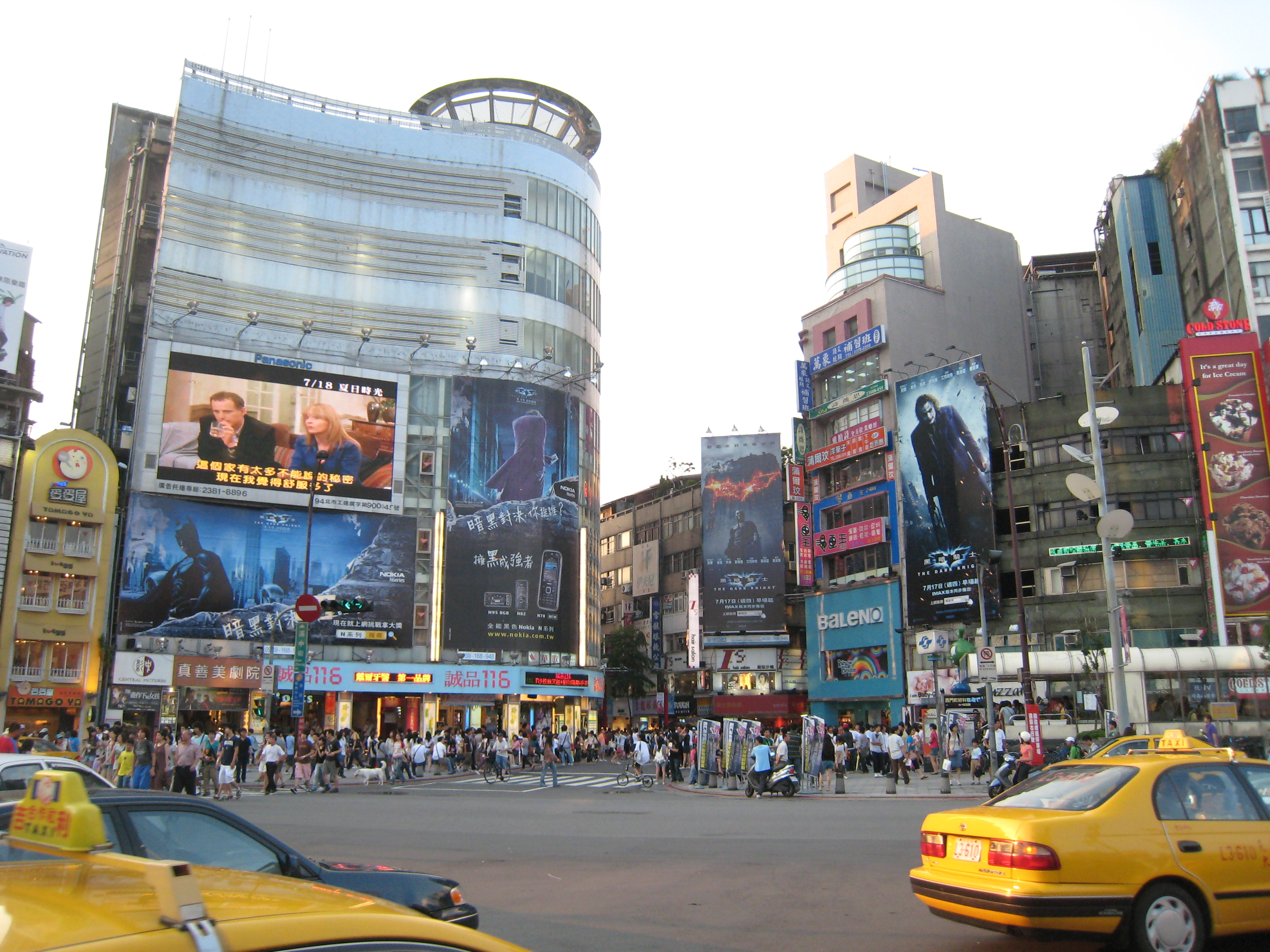 中影新世界大樓前。